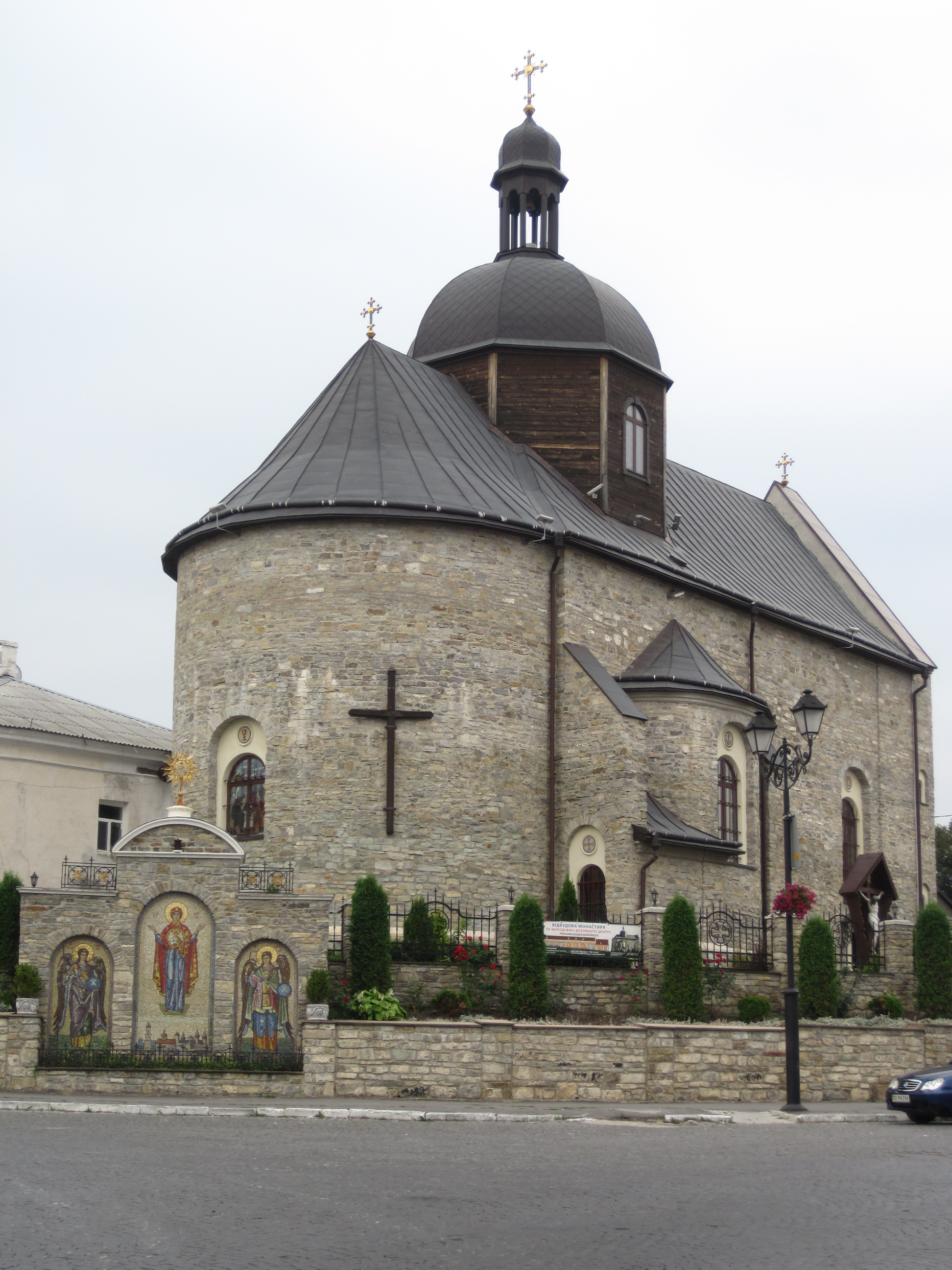 Келії Троїцького монастиря (келії монастиря св. Трійці), Кам'янець-Подільський, вул. Зарванська, 10а